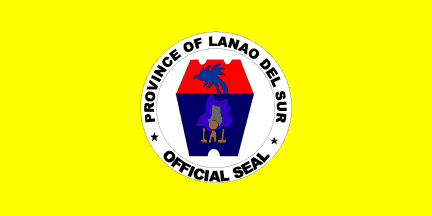 Dit materiaal is afkomstig van of en is door de auteur Jaume Ollé als GFDL beschikbaar gesteld, zie de toestemmingsemail. Hiermee vervallen de strictere voorwaarden in de disclaimers op de genoemde sites.Vrijgegeven bijdrage op Flags of the World van Jaume Olle. Zie deze verklaring op de Spaanstalige Wikipedia. GNU FDL